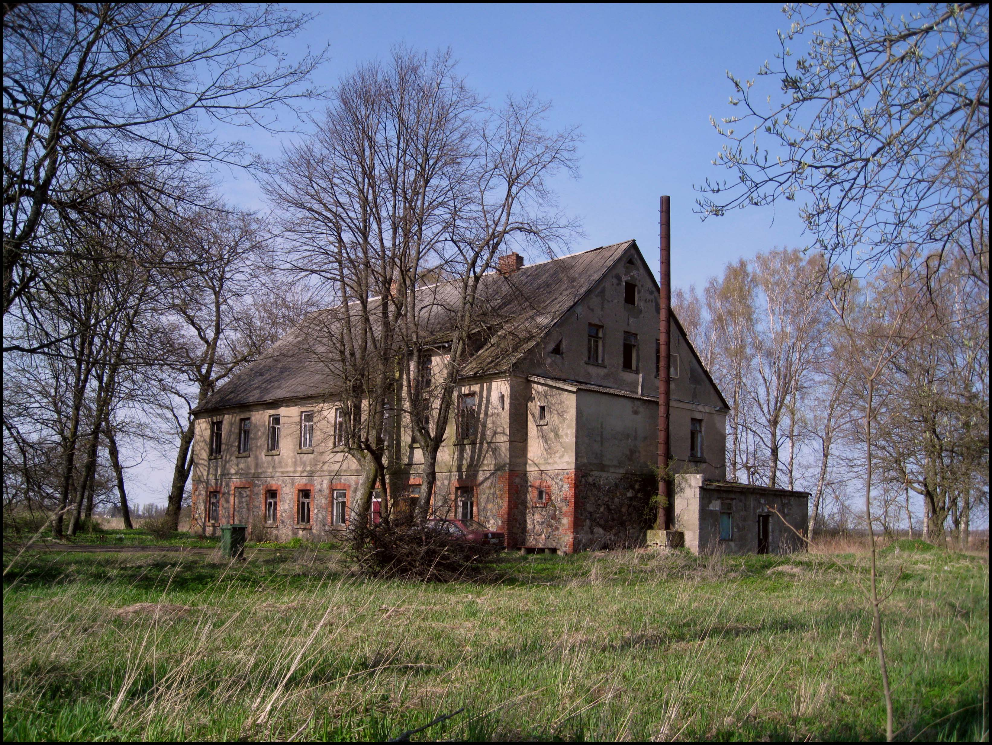 Gārzdes skola